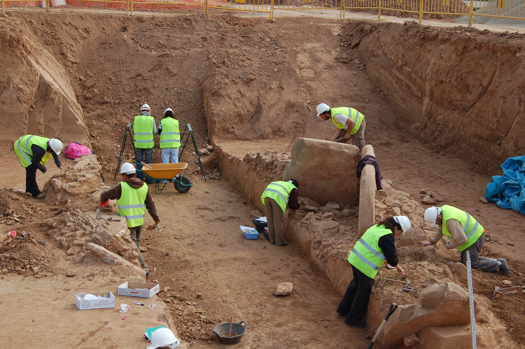 Excavació del megàlit dels Reguers de Seró.